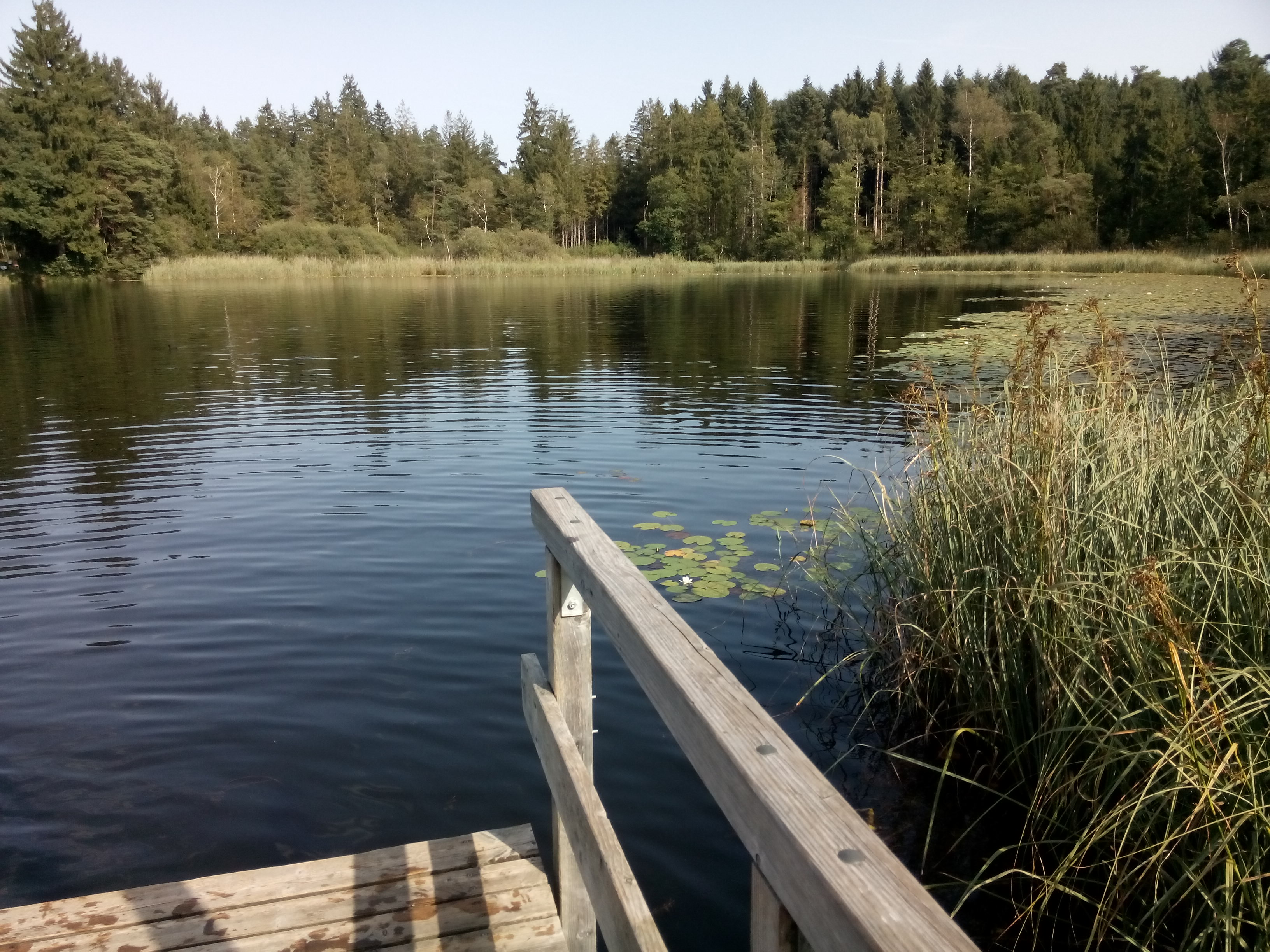 Blausee Wangen-Primisweiler vom westlichen Badesteg Richtung Süden gesehen